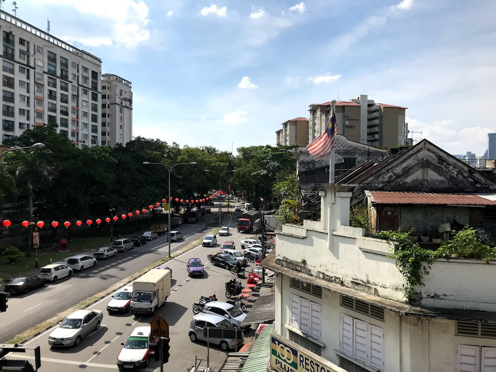 中文（台灣）: 啤律的街景